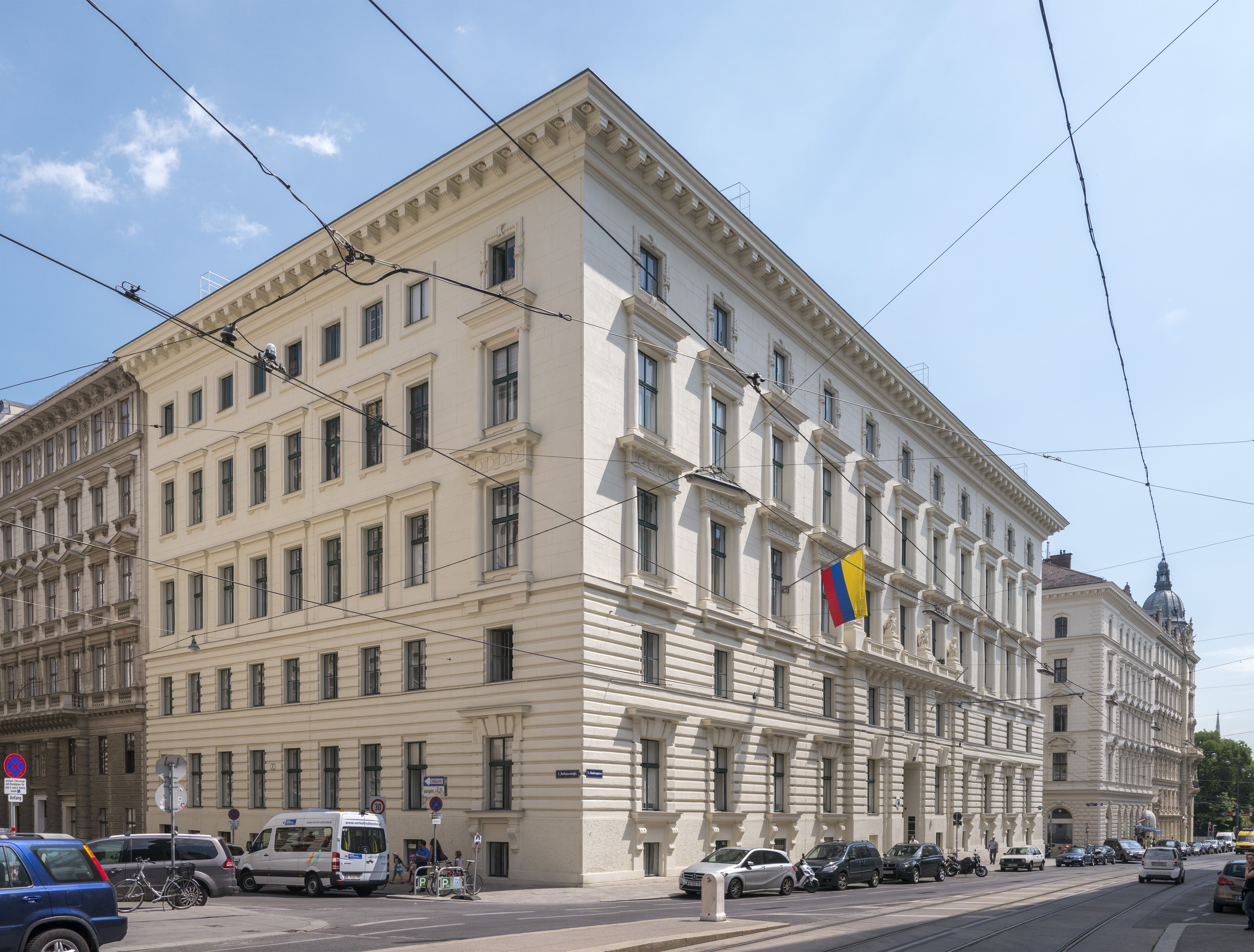 Botschaft von Kolumbien